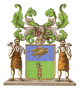 Vaakuna